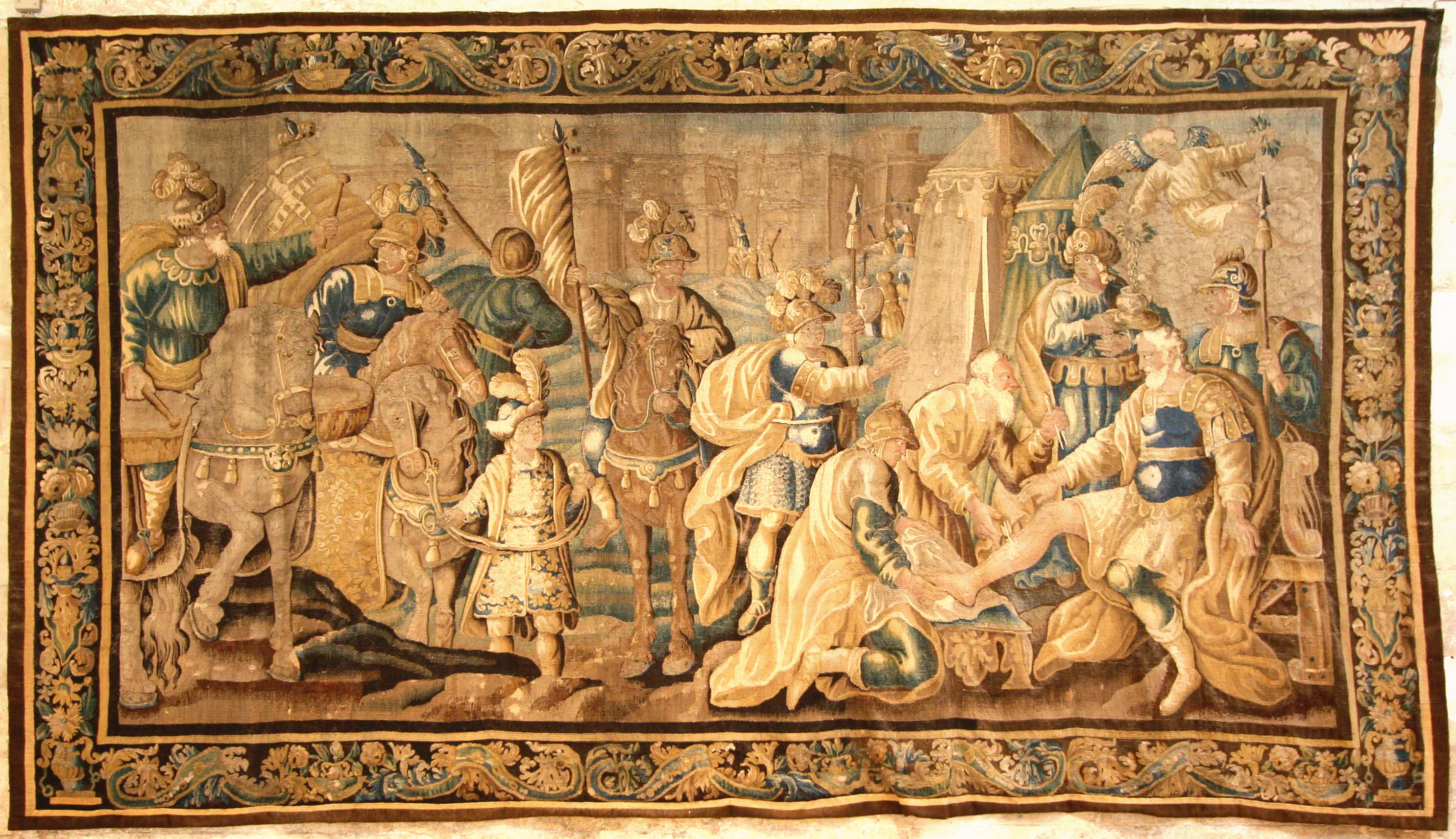 Tapisserie de Felletin de la fin du XVIIe siècle exposée dans une salle annexe du cloître Saint-Trophime à Arles représentant Godefroy de Bouillon blessé.